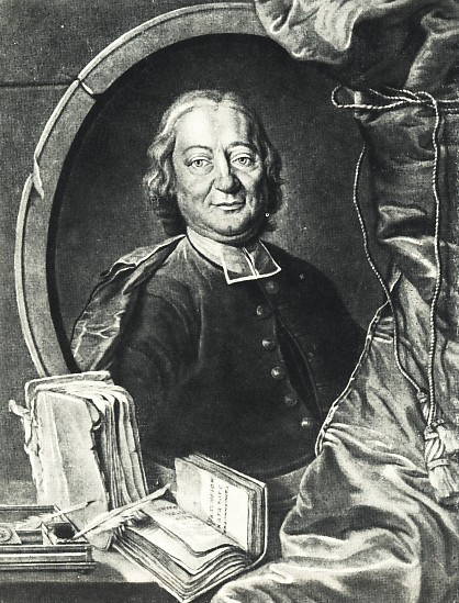 Schabkunstblatt von V. D. Preisler nach J. C. Füßli, 1741